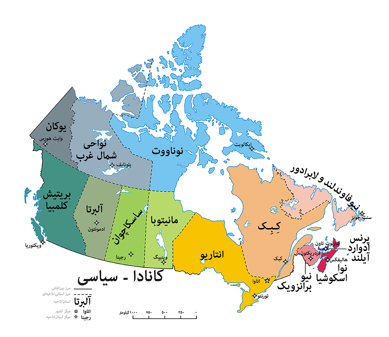 Political map of Canada in Farsi (Persian)